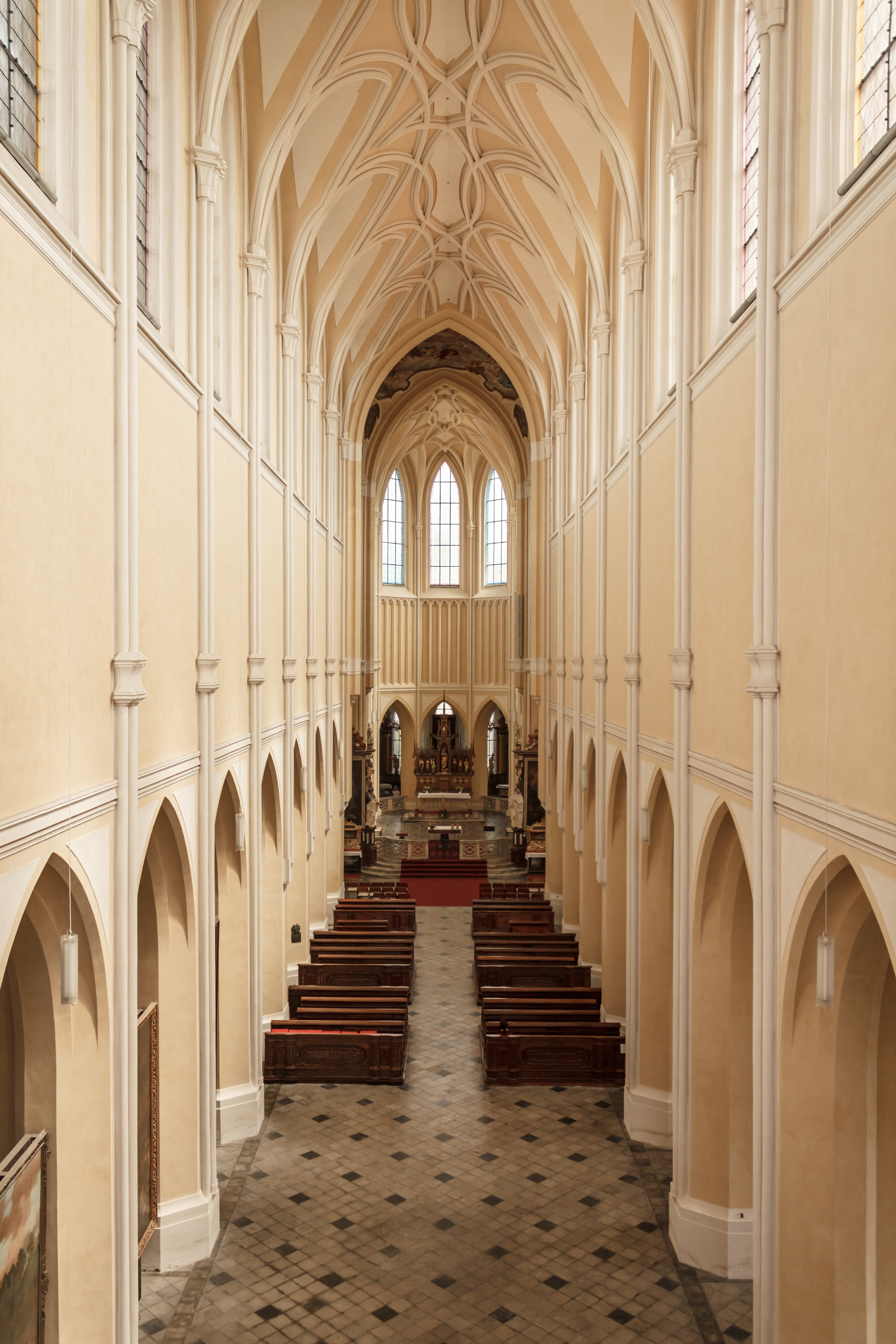 Pohled na interiér z kruchty